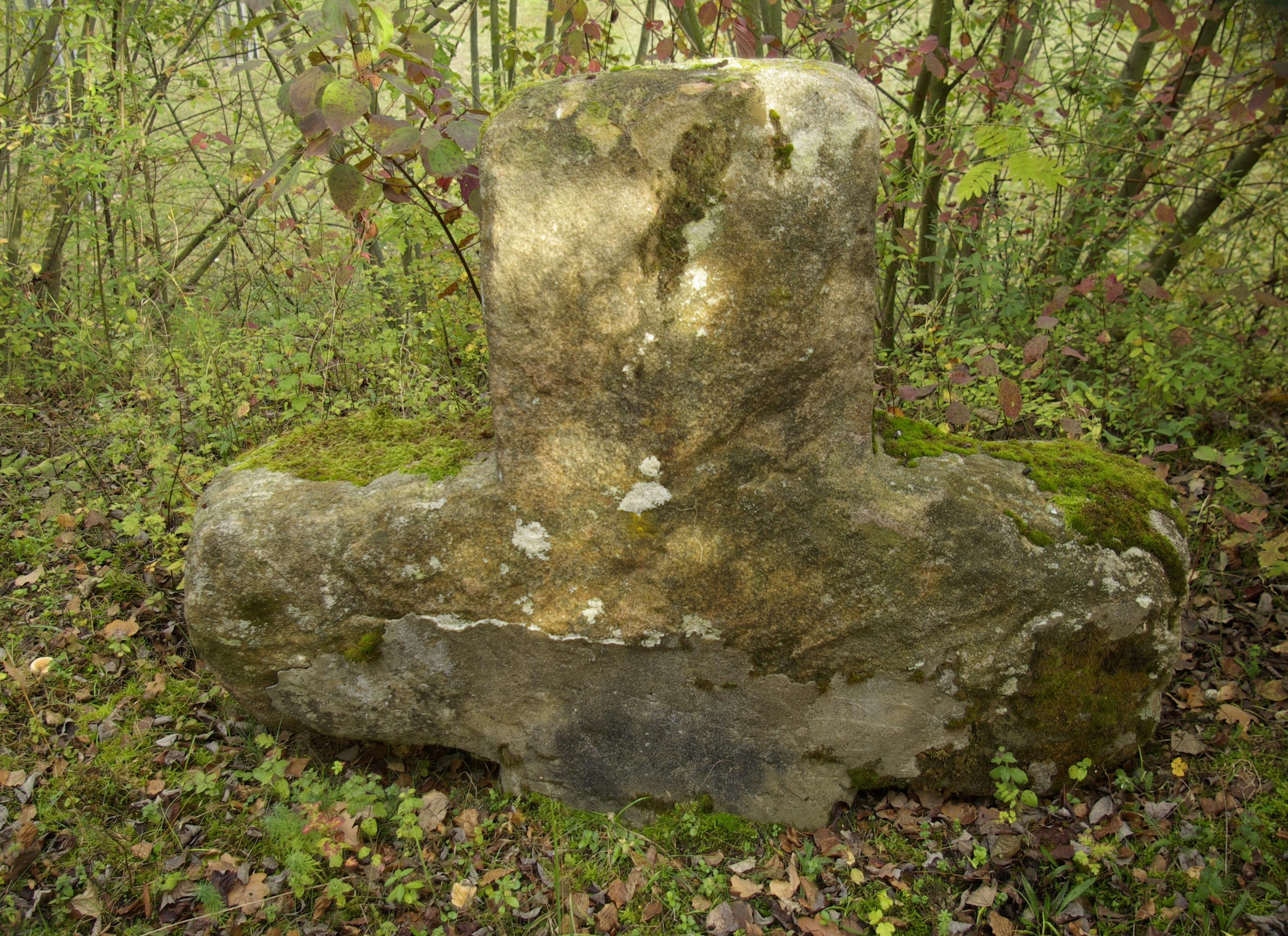 Steinkreuz bei Kriegenbrunn in der Waldabteilung beim Kreuzstein, heute Umspannwerk Kriegenbrunn, nördlich der Schleuse Kriegenbrunn